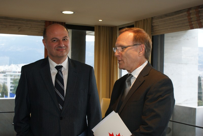 Την Πέμπτη 20 Δεκεμβρίου 2012, ο Υφυπουργός Εξωτερικών Κωνσταντίνος Τσιάρας, εκφώνησε ομιλία στην εκδήλωση της Πρεσβείας του Καναδά για τα 70 χρόνια σύναψης διπλωματικών σχέσεων Ελλάδας-Καναδά, η οποία πραγματοποιήθηκε στο Υπουργείο Εξωτερικών.